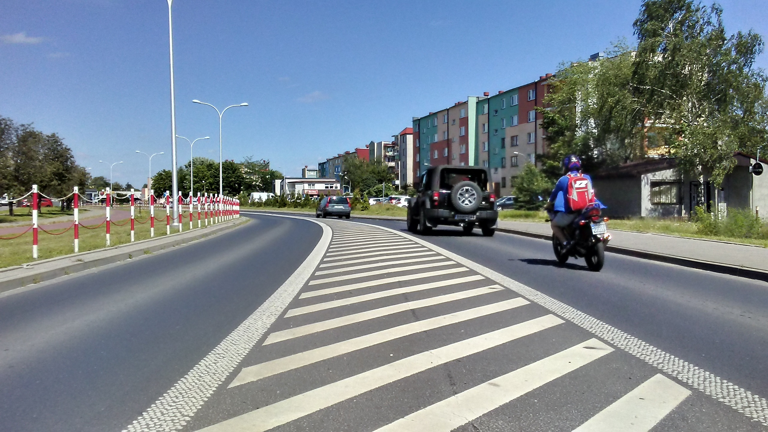 Ulica Wandy Panfil w Tomaszowie Mazowieckim, w województwie łódzkim